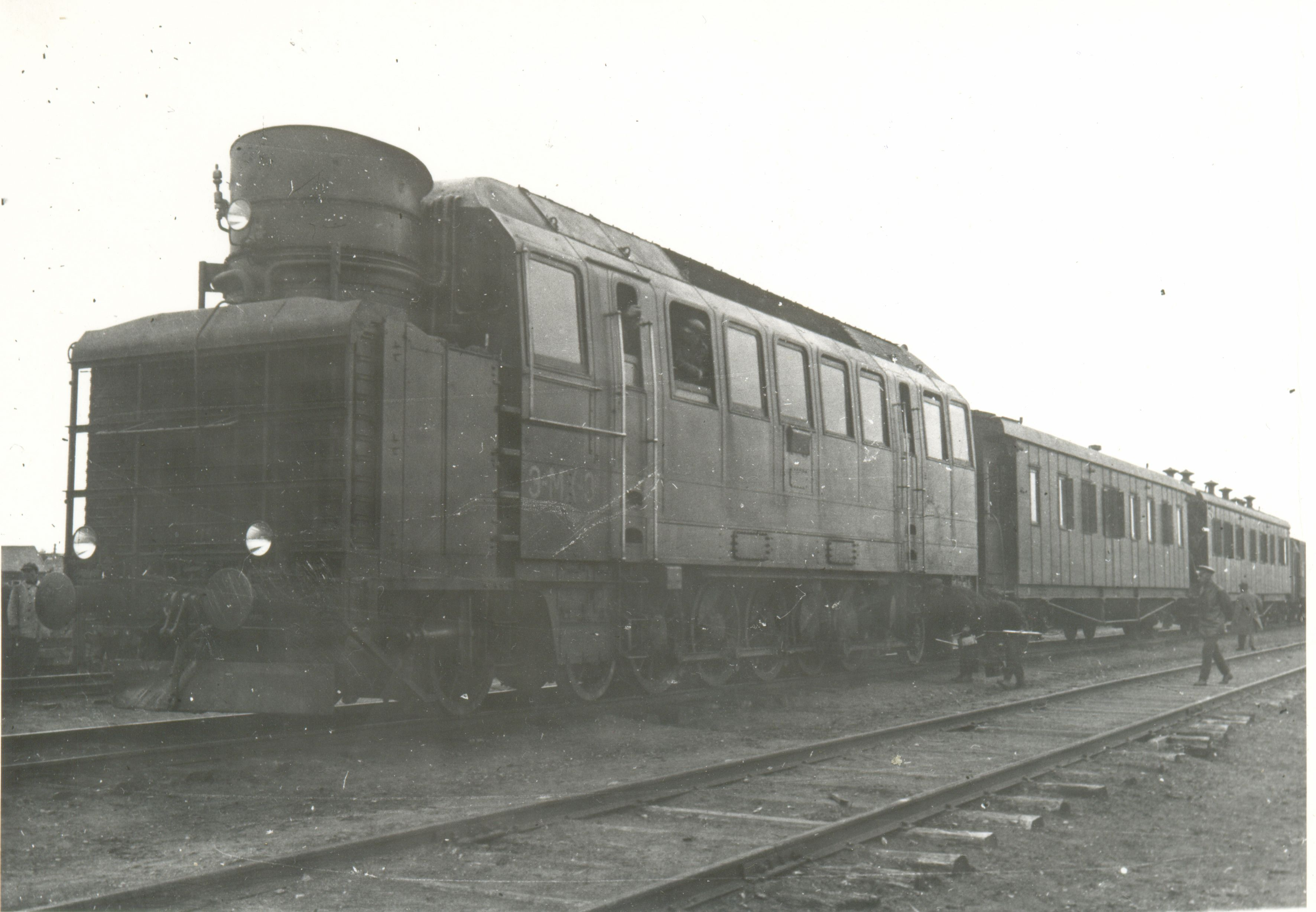 Тепловоз Эмх-3 с механической передачей.